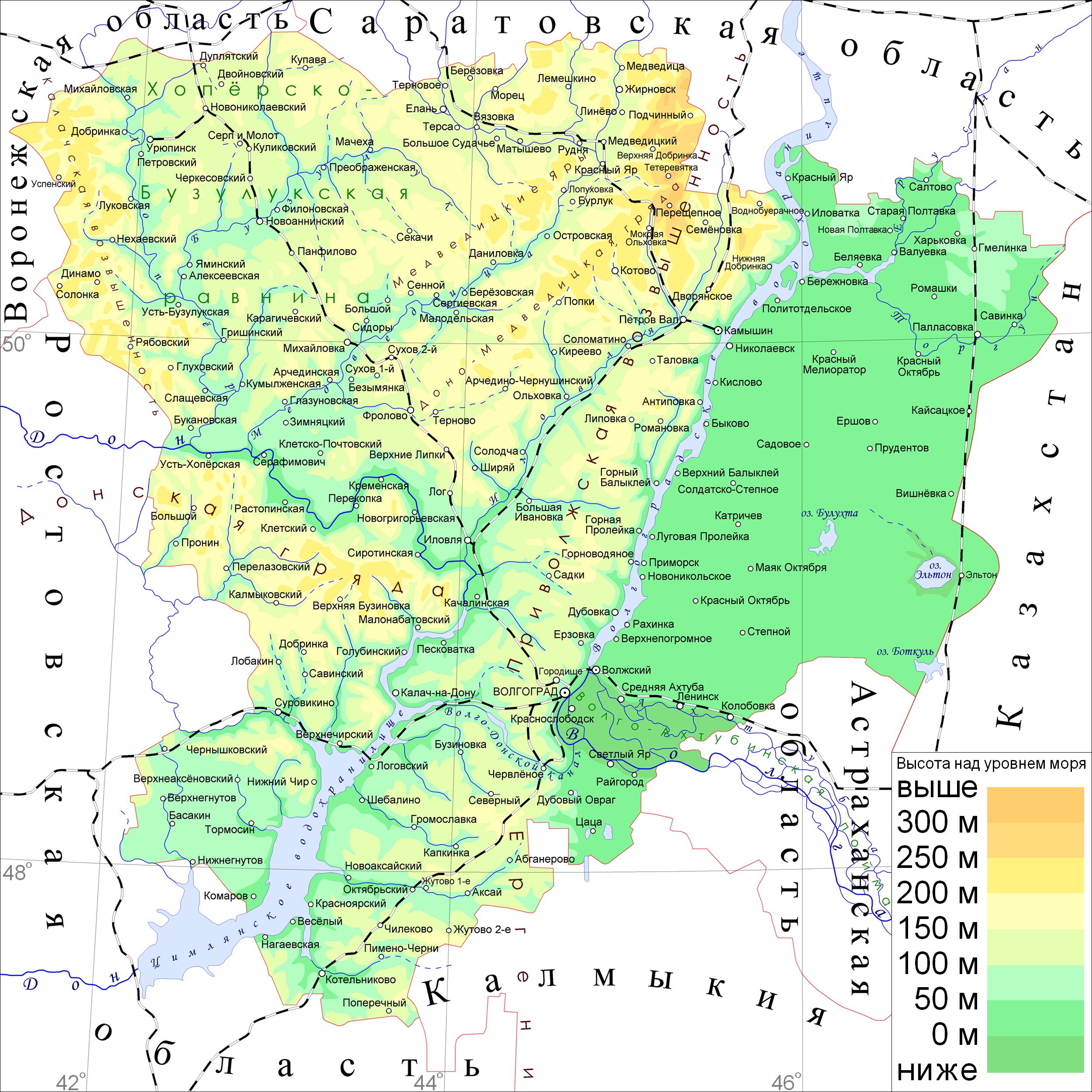 Физическая карта Волгоградской области. указаны железные дороги.